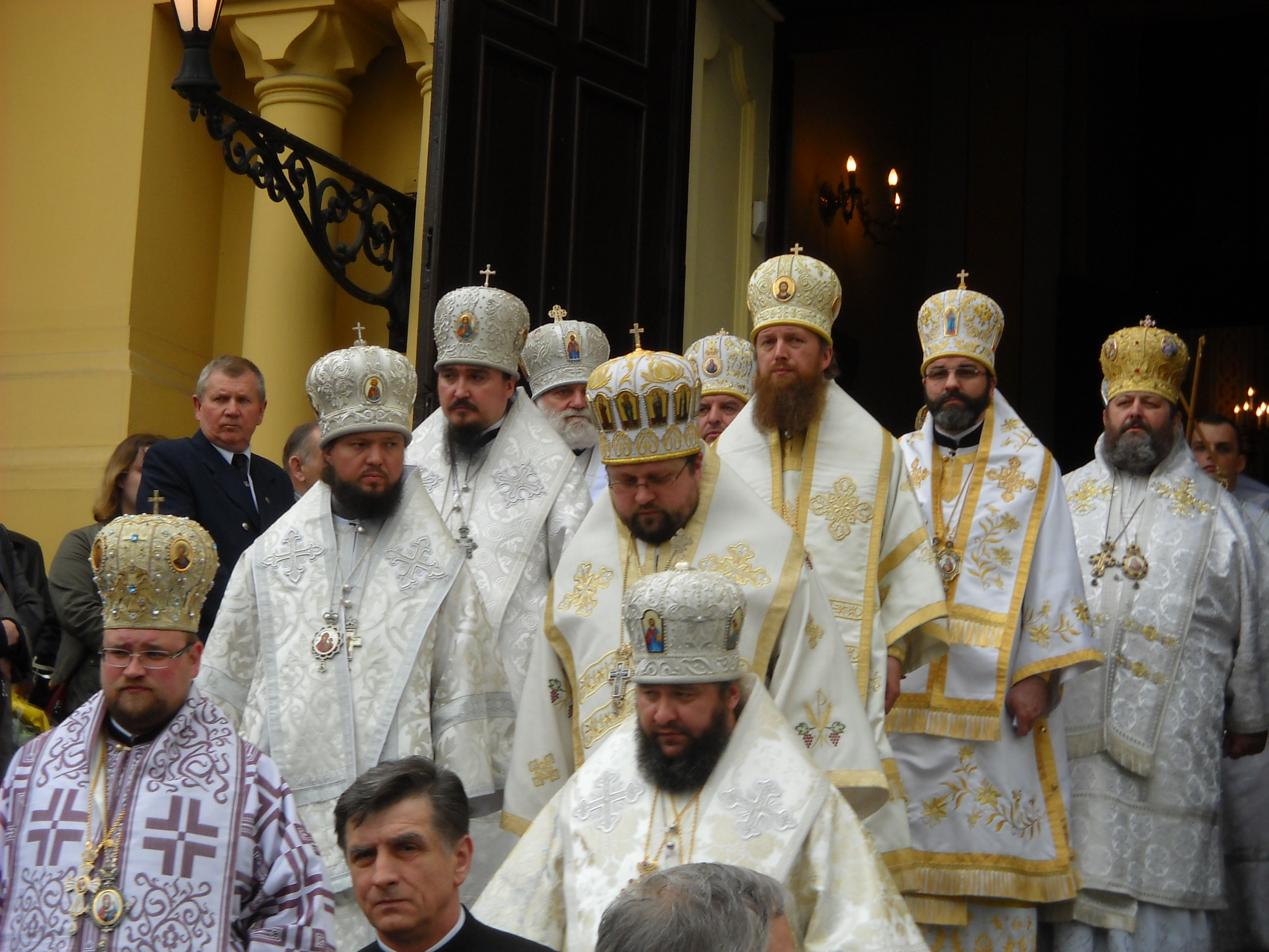 Hierarchowie Polskiego Autokefalicznego Kościoła Prawosławnego, Ukraińskiego Kościoła Prawosławnego Patriarchatu Moskiewskiego oraz Kościoła Prawosławnego Czech i Słowacji na pogrzebie arcybiskupa Mirona (Chodakowskiego)